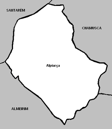 Mapa de Alpiarça Location of Alpiarça municipality. Map created by Brian Boru in December 2005.